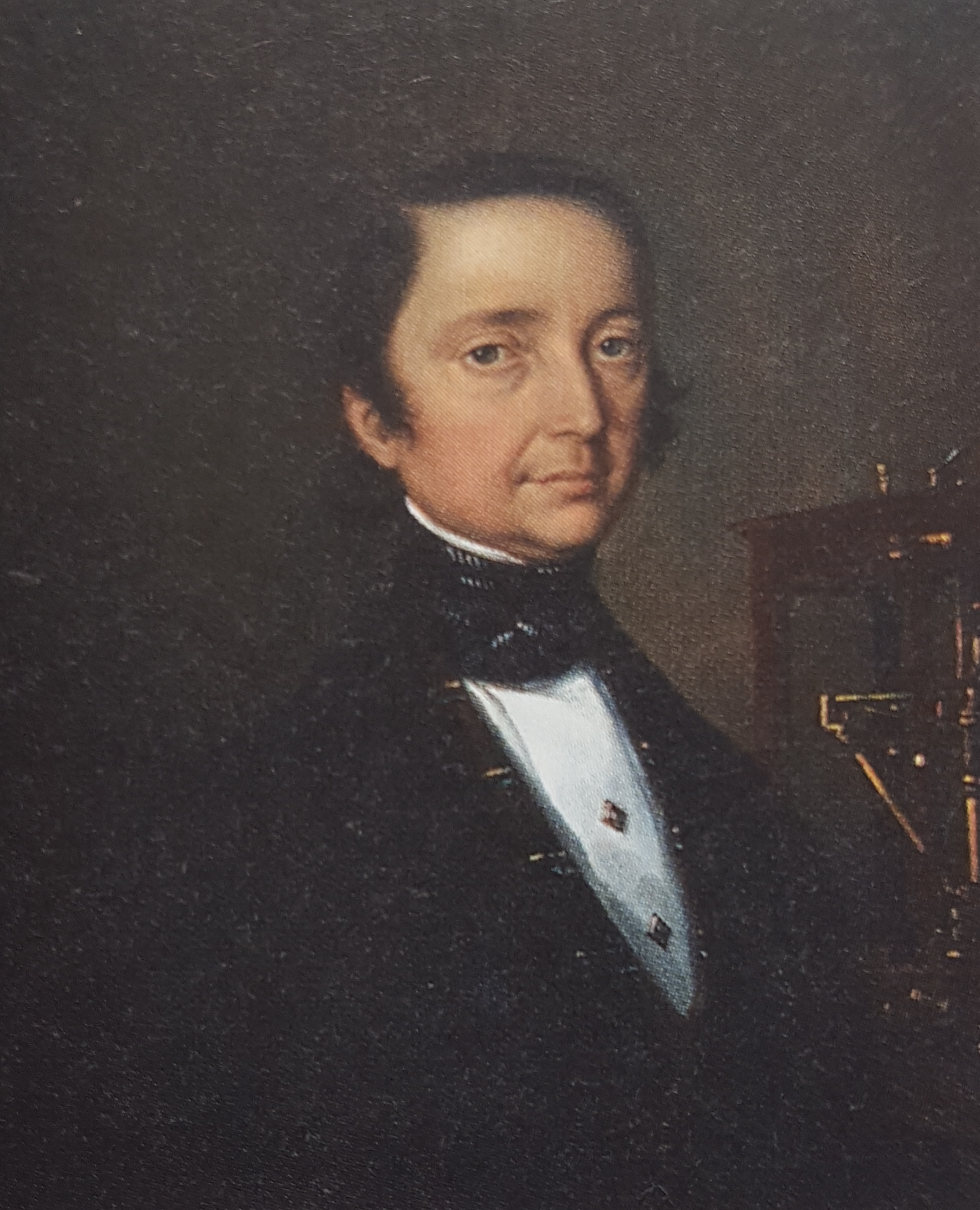 Lars Fredrik Svanberg porträtterad av Johannes Rosenbrock